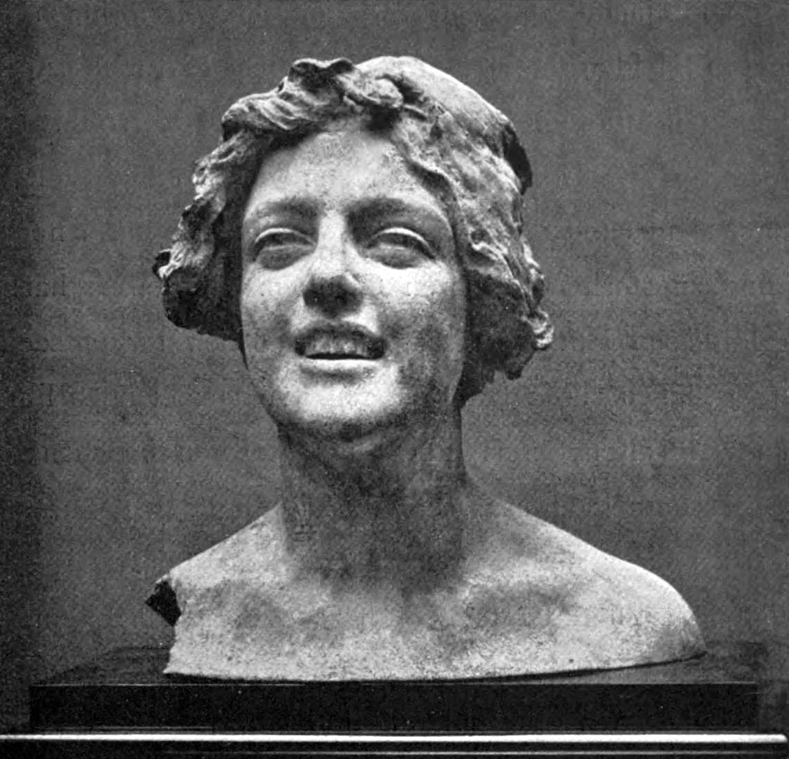 Clara, buste